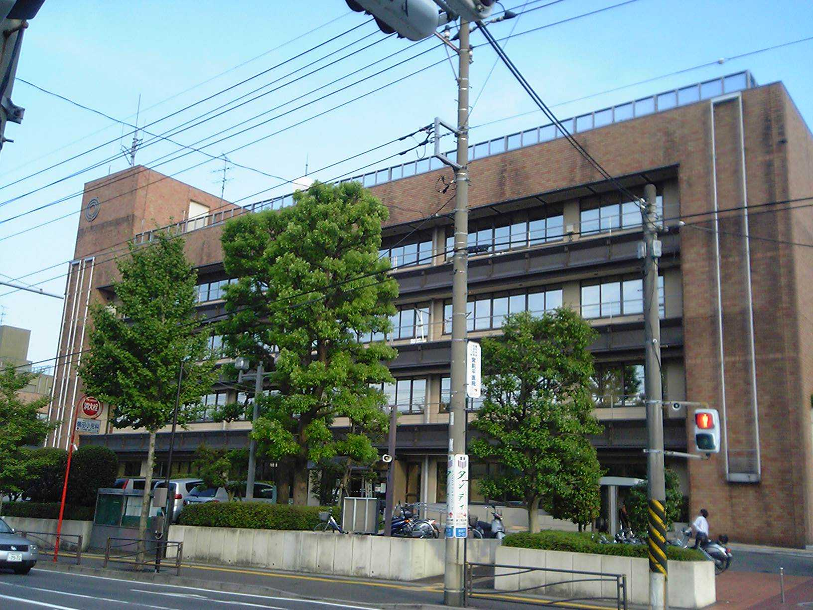 Miyamae-ku Ward Office, Miyamae-ku, Kawasaki, Kanagawa, Japan (鶴見区役所)